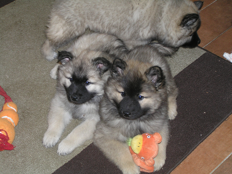 Puppies van de Eurasier, 8 weken oud